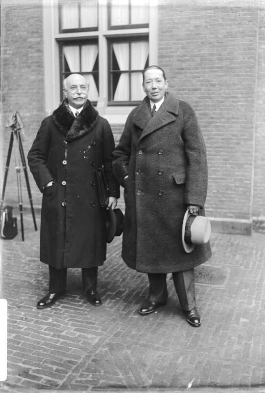 Mironescu, der rumänische Aussenminister kommt von Haag nach Berlin ! Der rumänische Aussenminister Mironescu kommt nach Berlin, um wegen des deutsch-rumänischen Handelsvertrages Besprechnungen zu führen. Neueste Aufnahmen von der Haager Schluss-Conferenz ! Der rumänische Aussenminister Titulescu und der rumänische Minister Mironescu auf der Haager Conferenz. [Text nach Bild 102-08980, Jan. 1930]